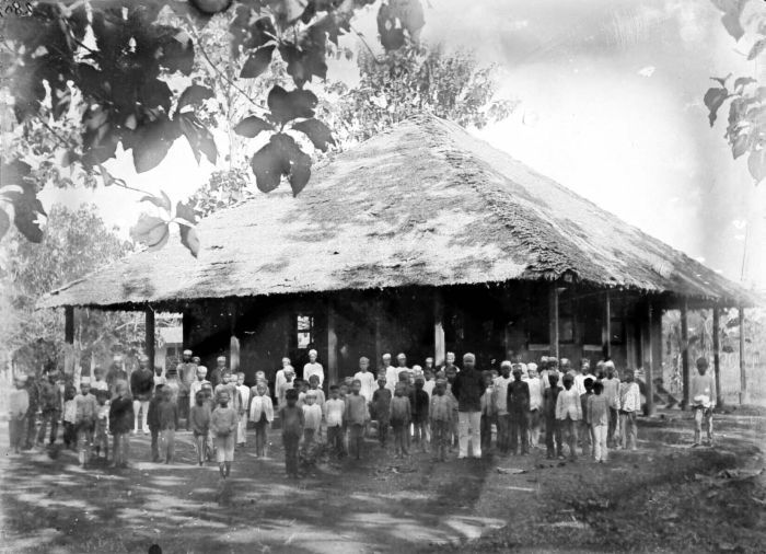 Negatief. Inlandse school te Barabai, Zuidoost-Borneo